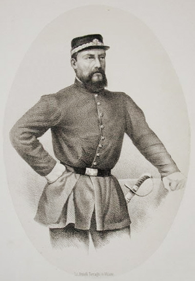 Il generale Giacomo Medici (1859). Litografia edita dai Fratelli Terzaghi nel 1861, ridotta, ritoccata.